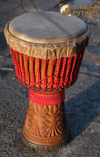 Bęben djembe wykonany w Gwinei z drewna balafonowego, naciągnięty kozią skórą.